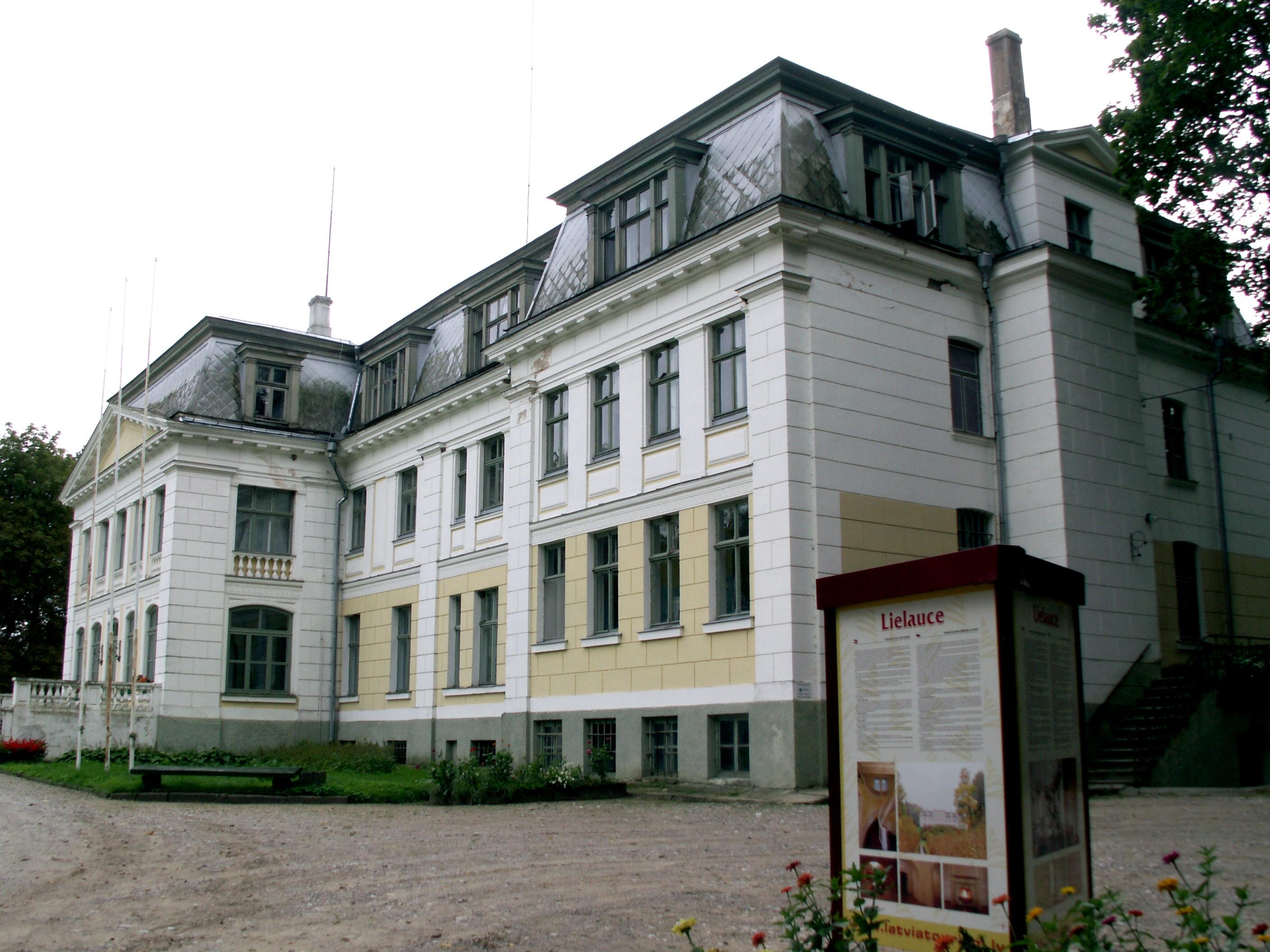 Lielaucė, Lielaucės pagastas, Latvija